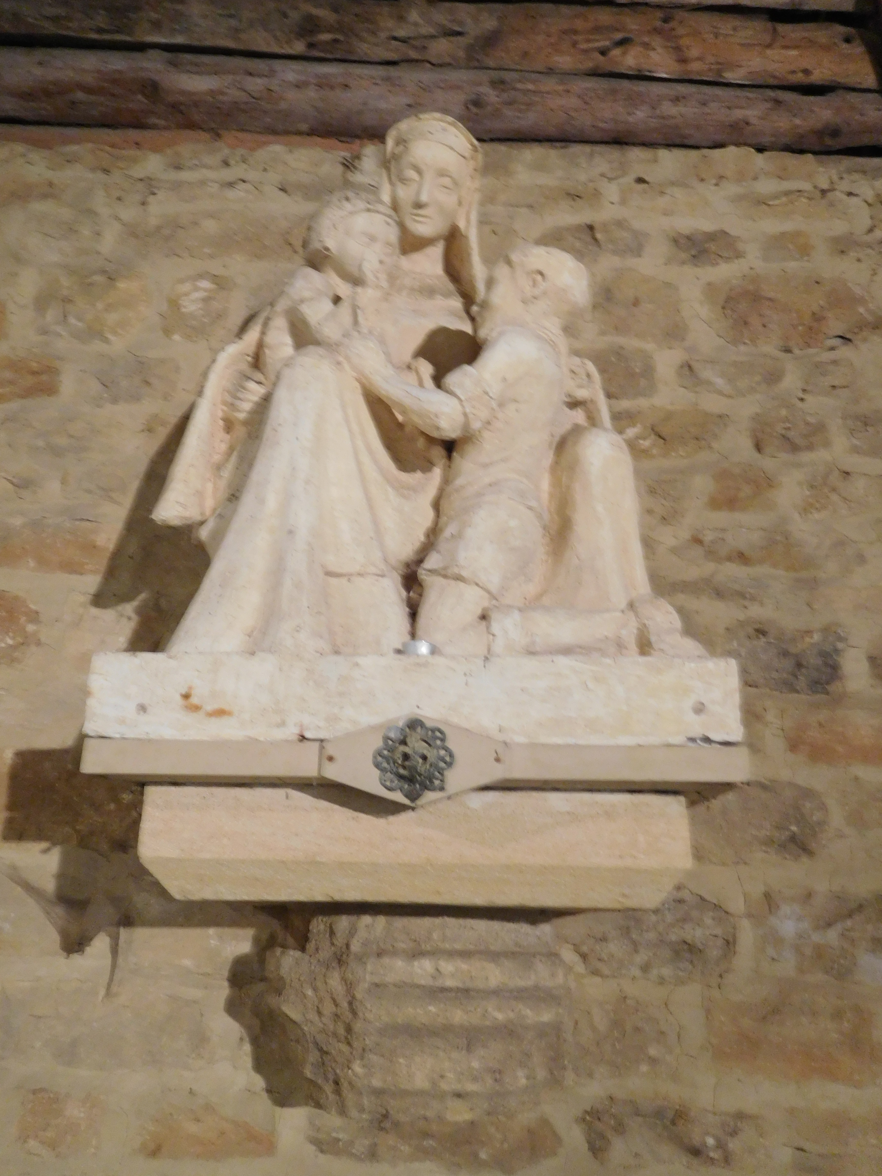 La statue de Notre-Dame-des-Scouts, dans la chapelle du même nom à Orval, près de l'abbaye.